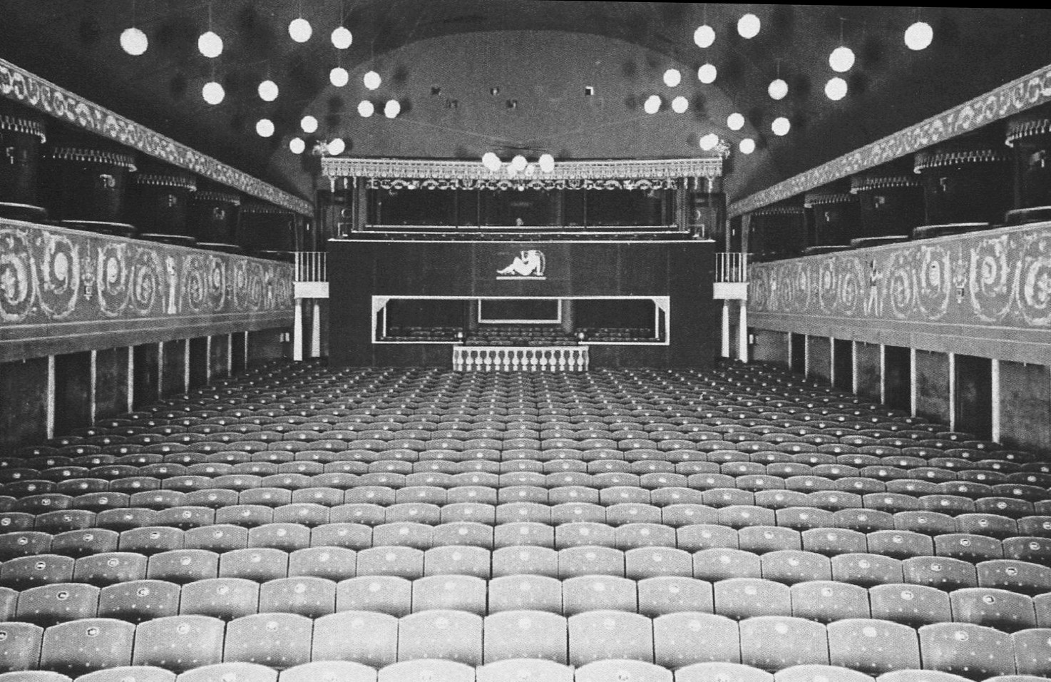 Biografen "Skandia" i Stockholm, salongen mot fondläktaren